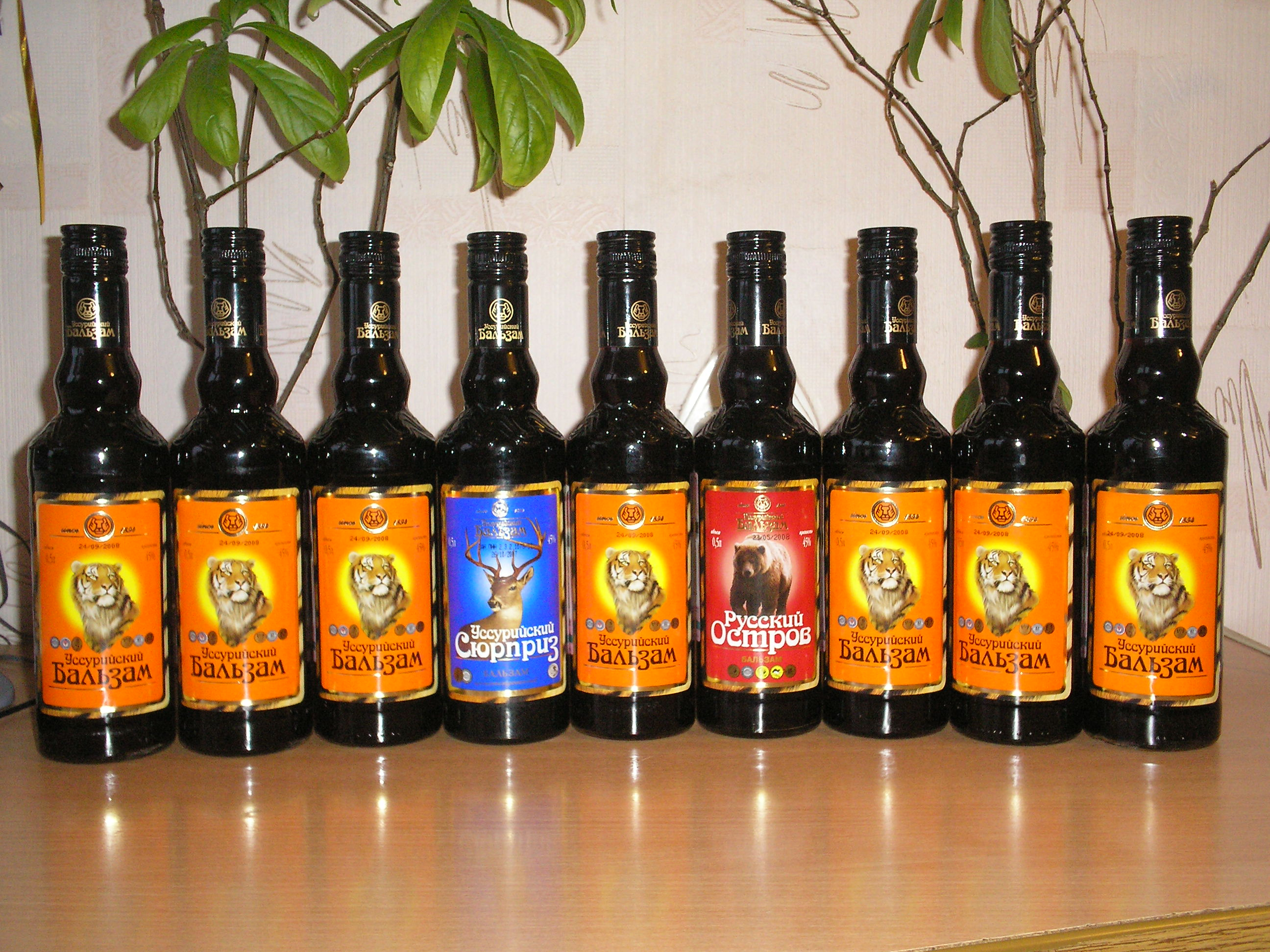 Уссурийский бальзам, бальзам Русский остров, бальзам Уссурийский сюрприз